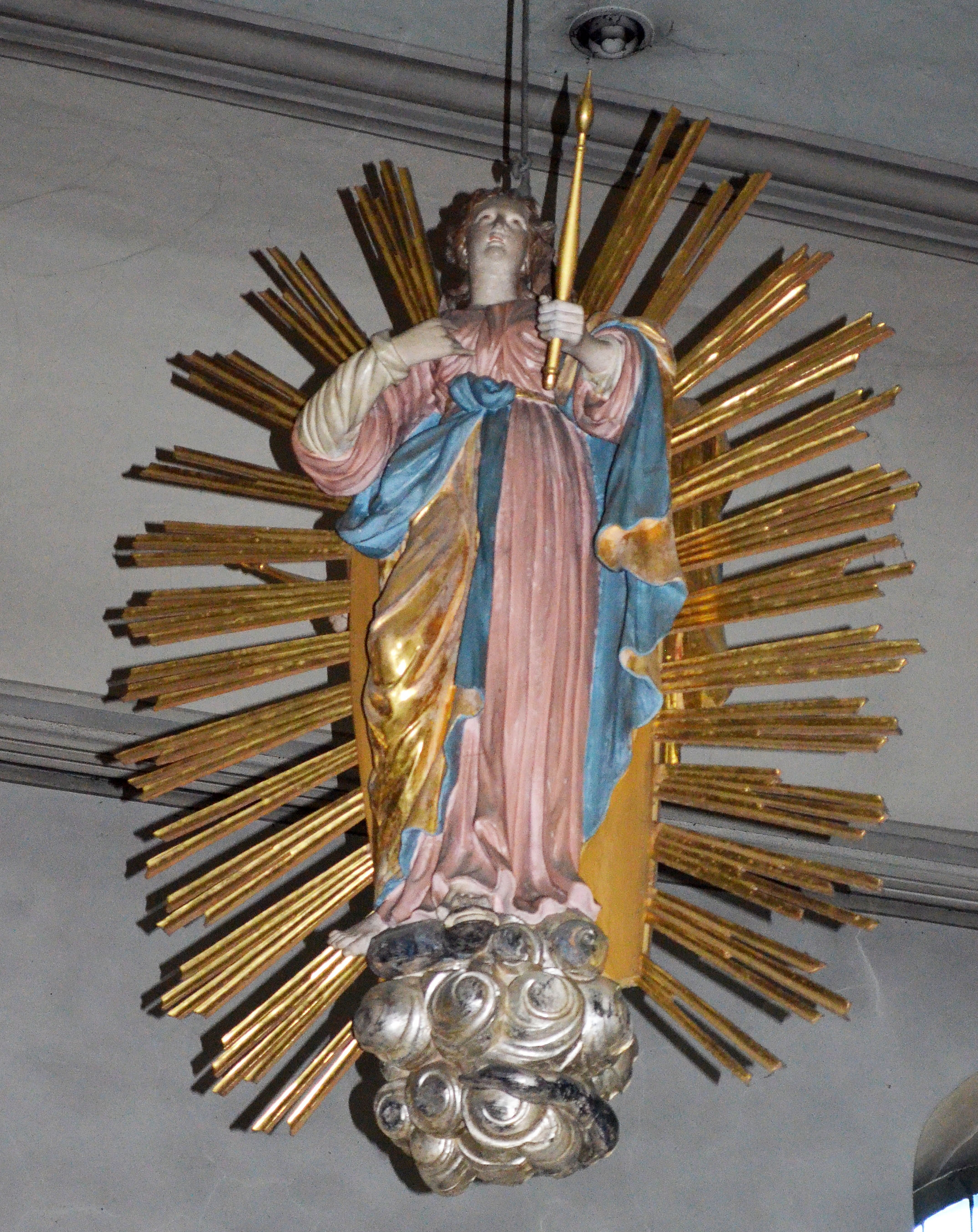 Alme, St.Ludgerus. Die Strahlenkranzmadonna